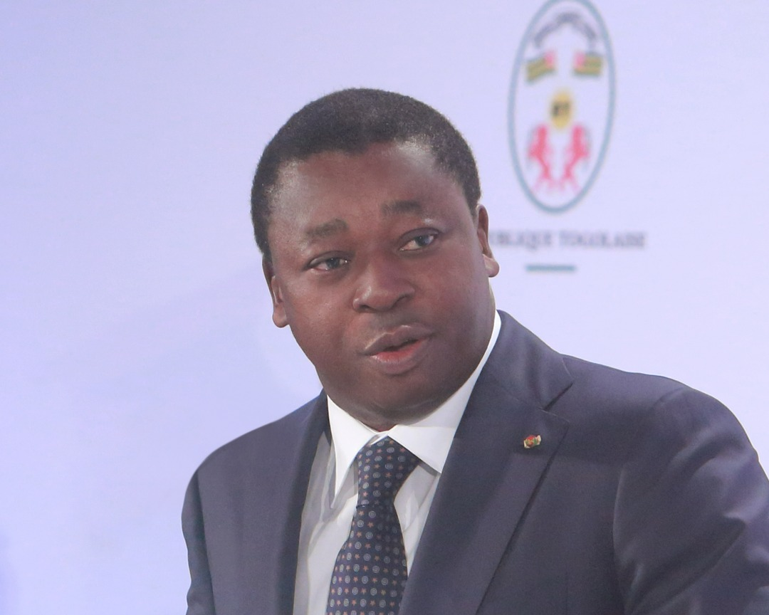 Photo du Président Faure Gnassingbé lors du lancement du Plan National de Développement (PND)